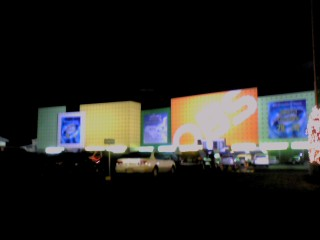 2007년에 제가 직접 찍어서 네이버 카페에 올린 사진입니다.